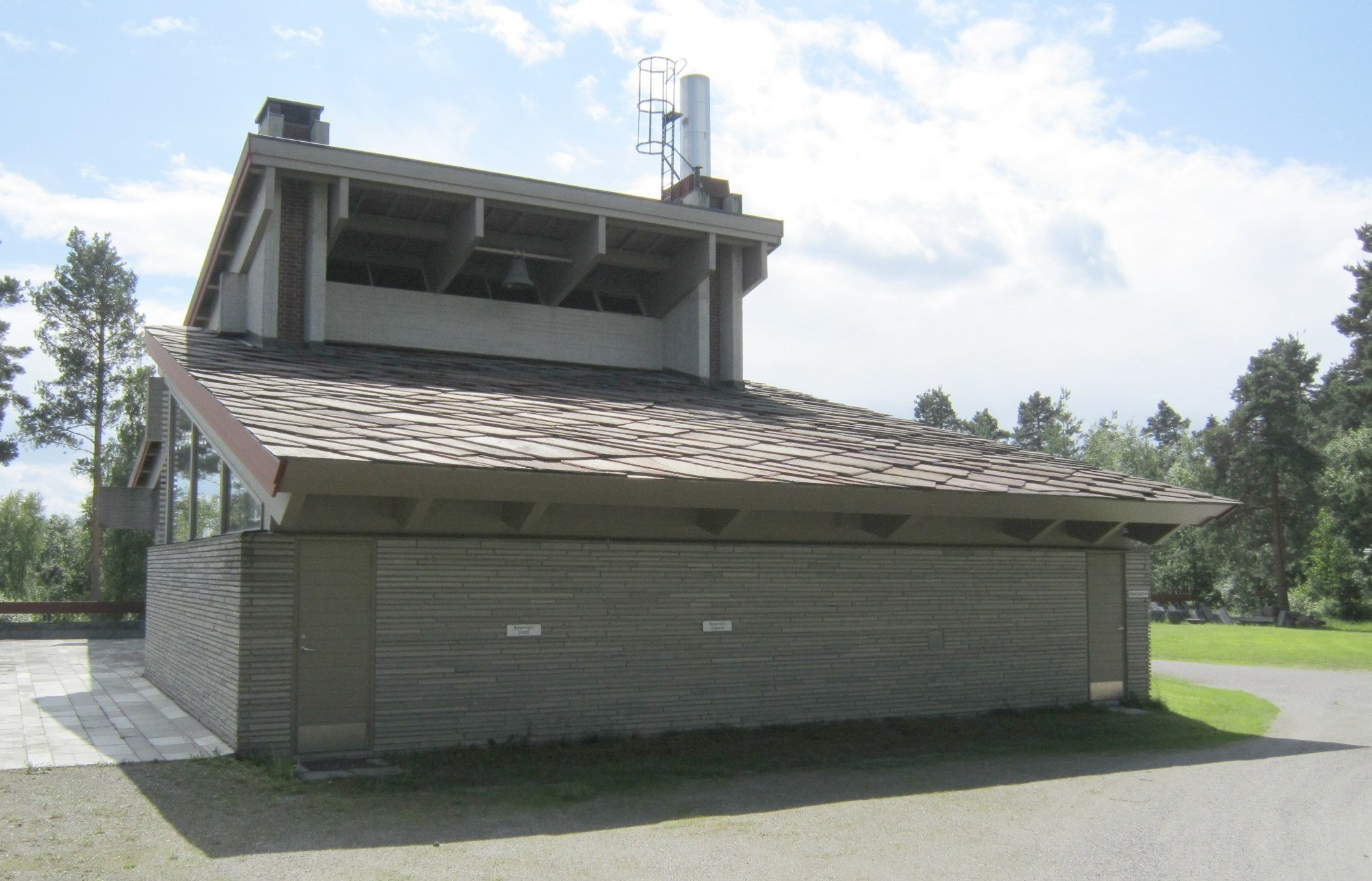 Kongsvinger krematorium